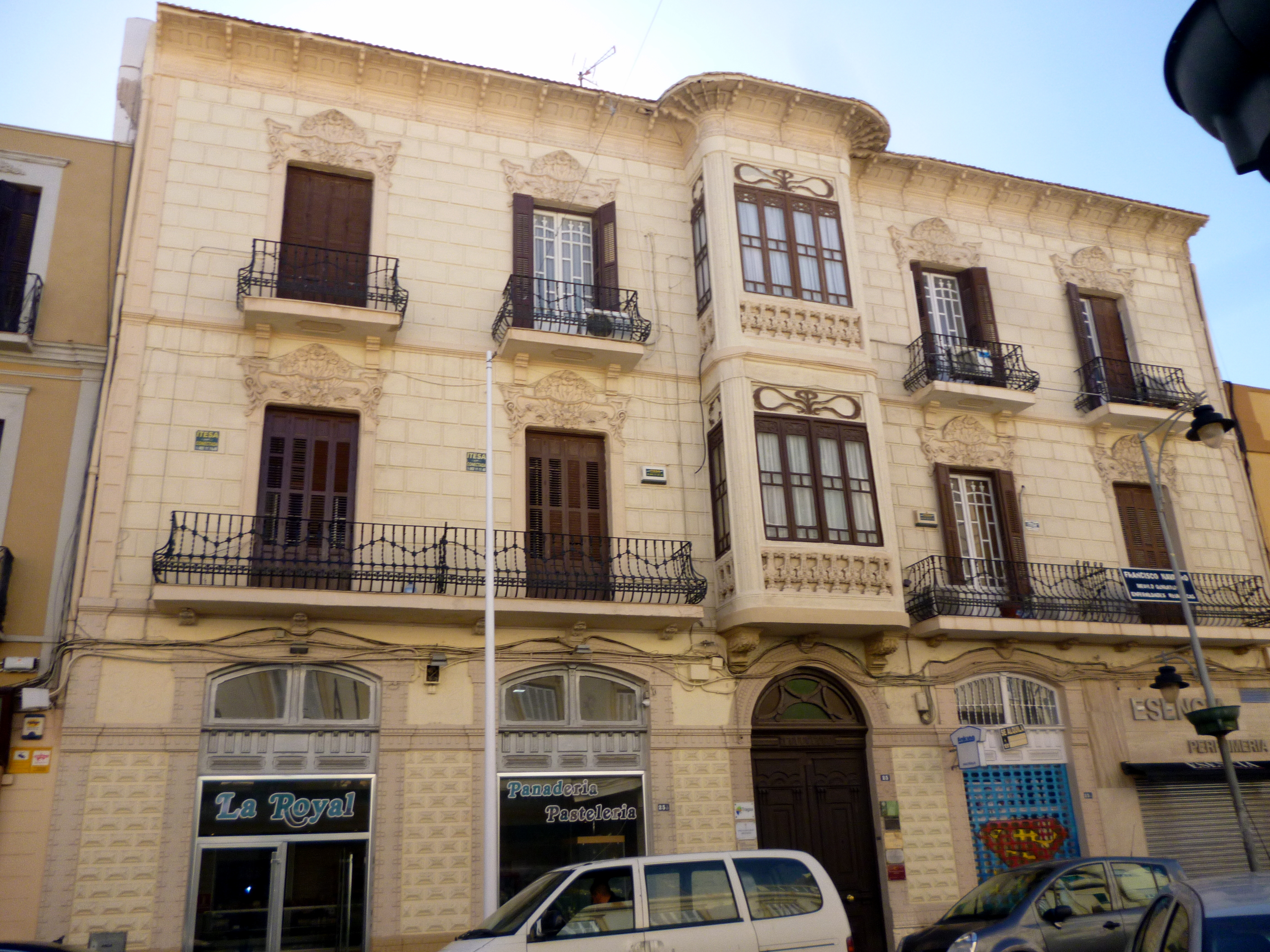 Casa de María Belso Reich